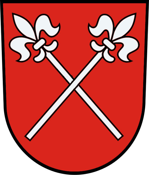 Wappen des Ministerialen-Geschlechts "von Remmincheim" (Nachbildung)